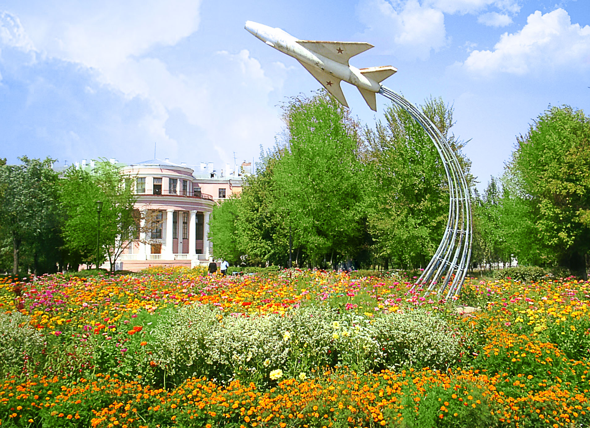 Центральный парк культуры и отдыха в Ахтубинске